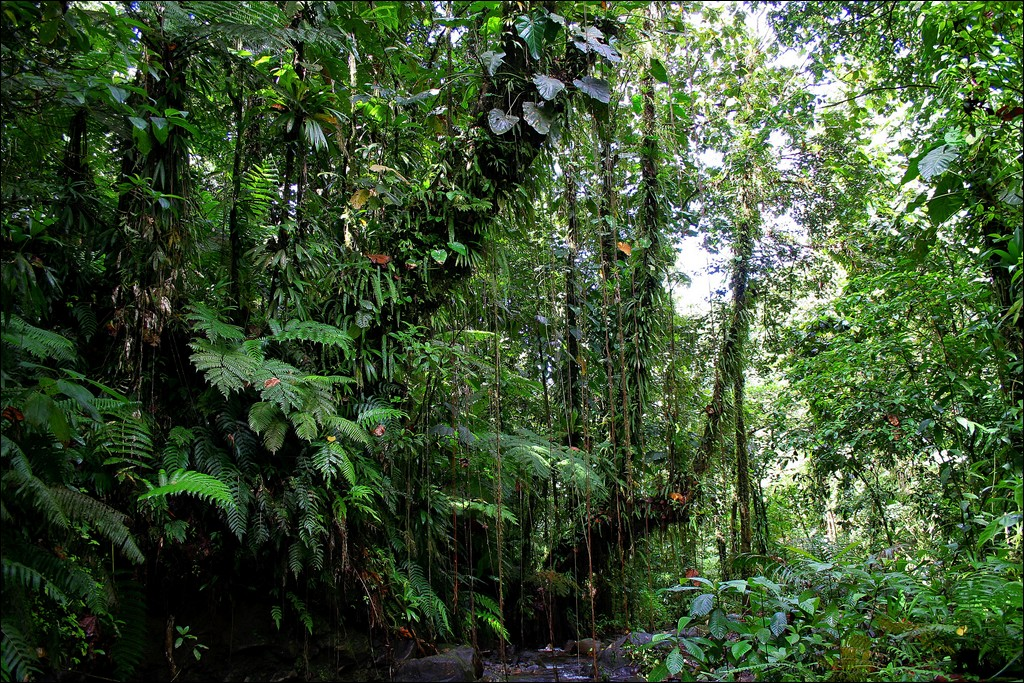 Guadeloupe - Parc National - Forêt Humide, à Goyave.